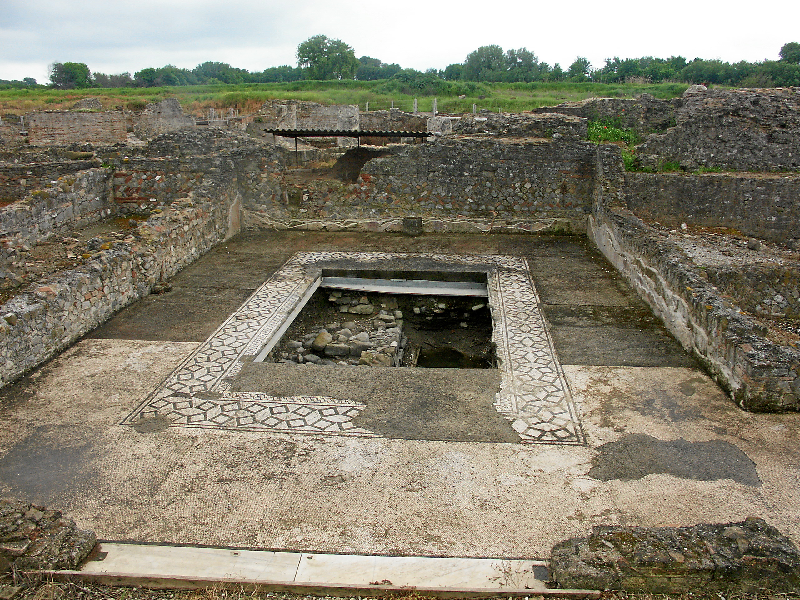 Sybaris: Atrium eines röm. Hauses mit Mosaiken